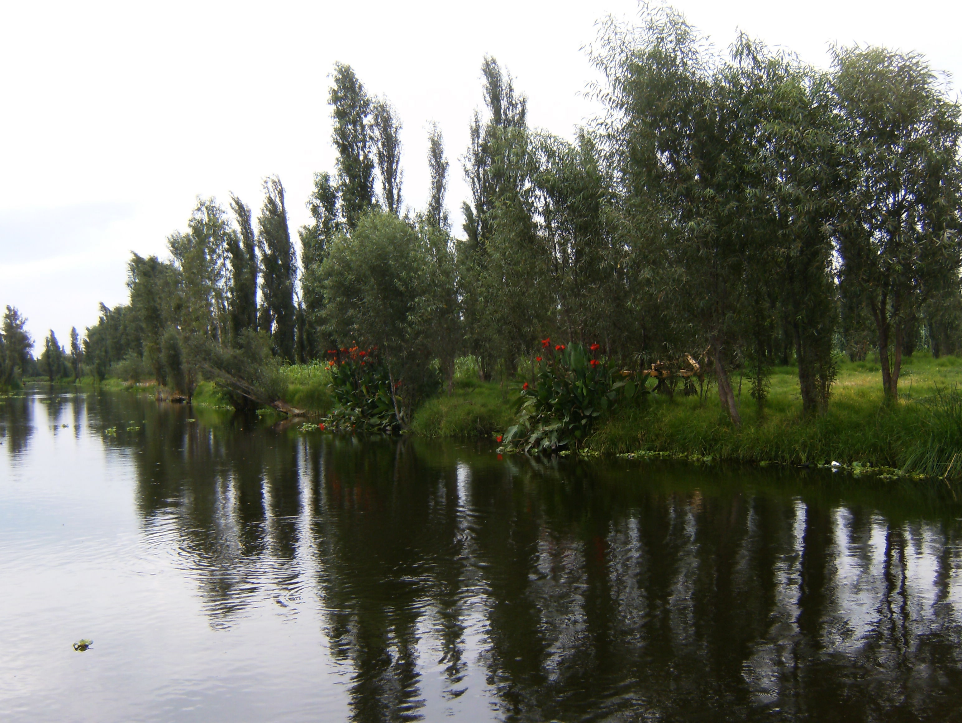 Parque Ecologico de Xochimilco